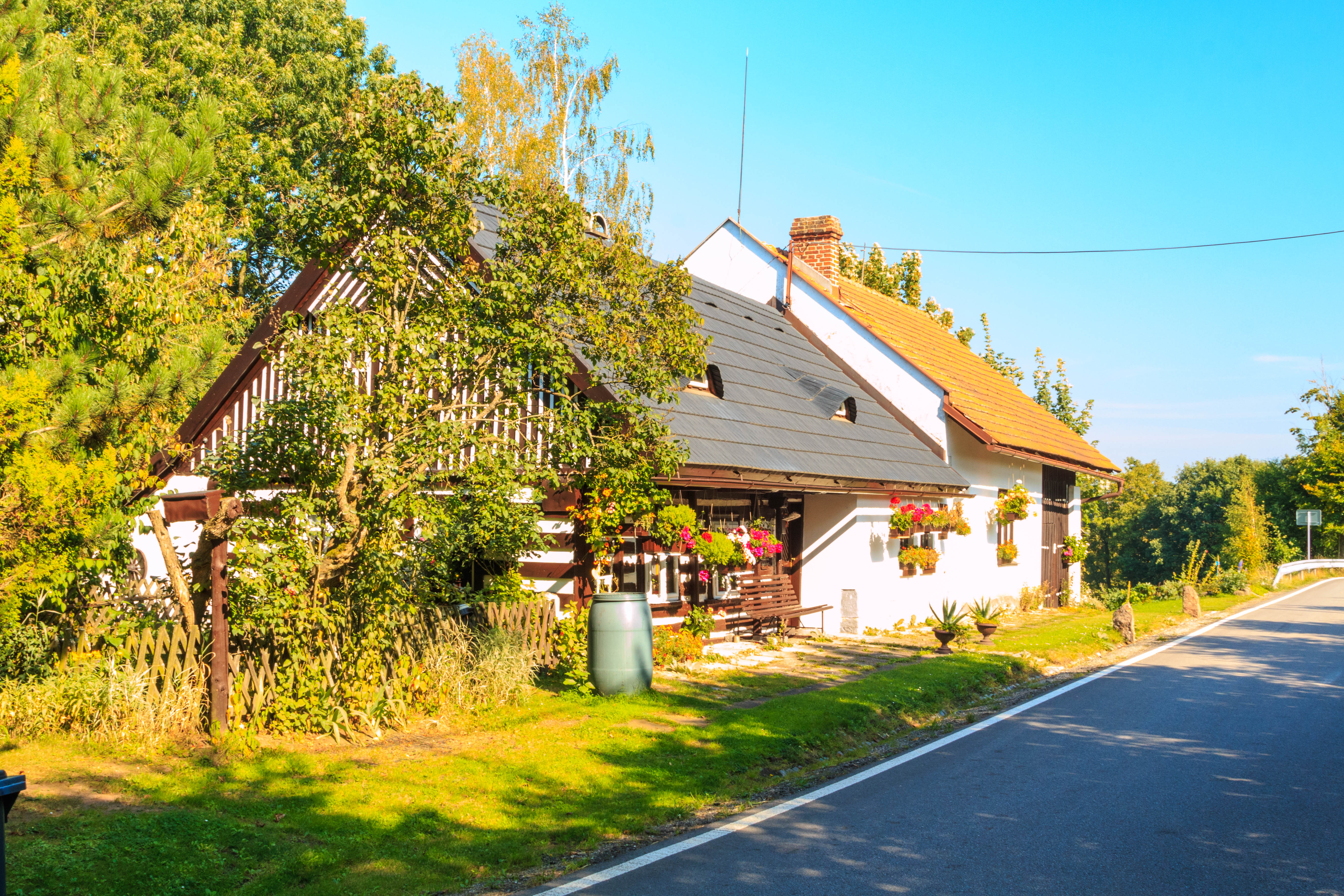 Dráčov u Lomnice nad Popelkou - čp. 10